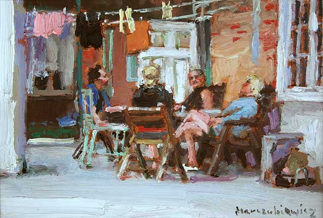 Adam Marczukiewicz "U Jasia" olej/tektura 20 x 30 cm 2008 r.